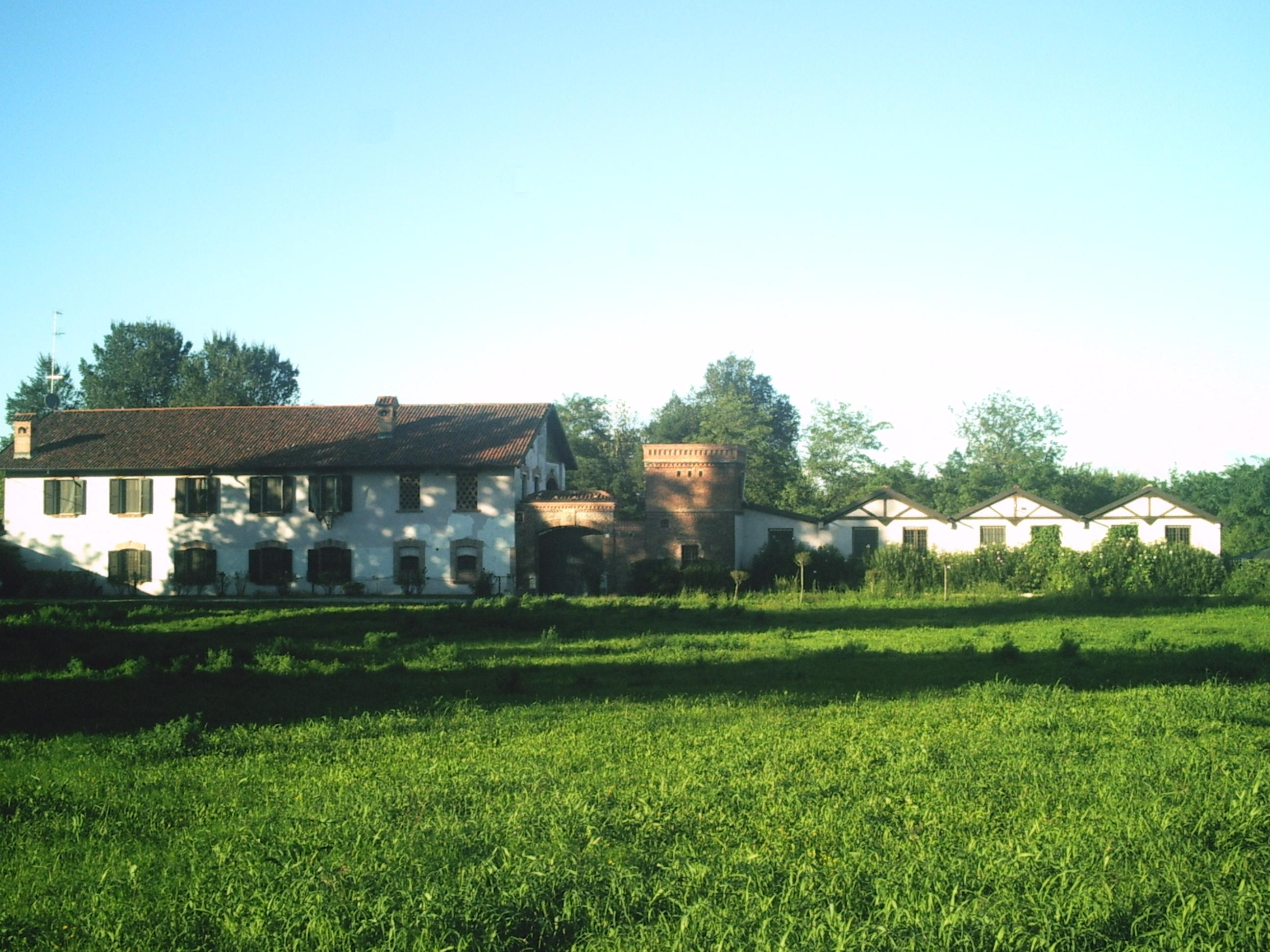 Il Mulino Gajo sulle sponde dell'Olona a Parabiago